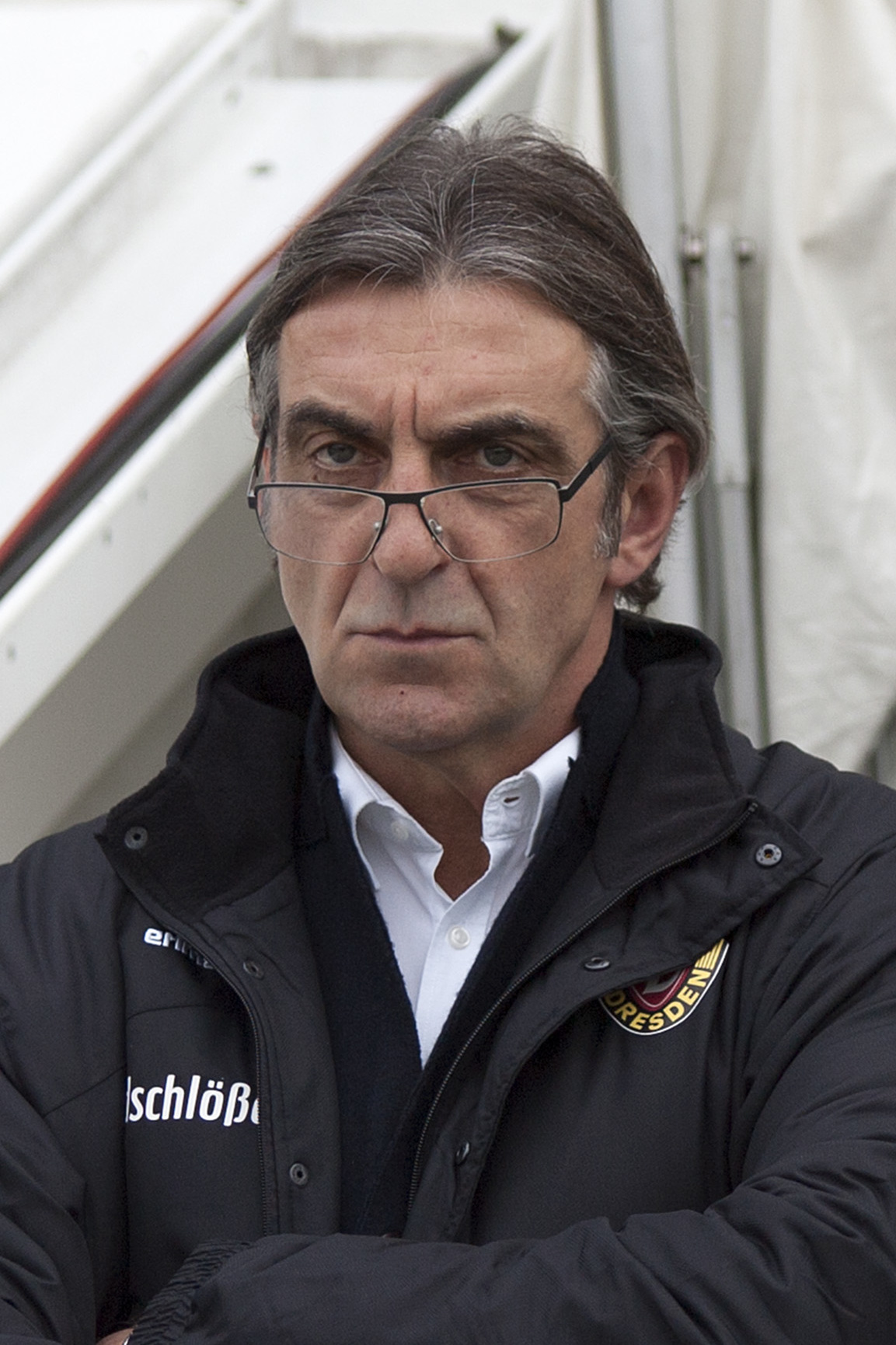 Ralf Minge (2015)